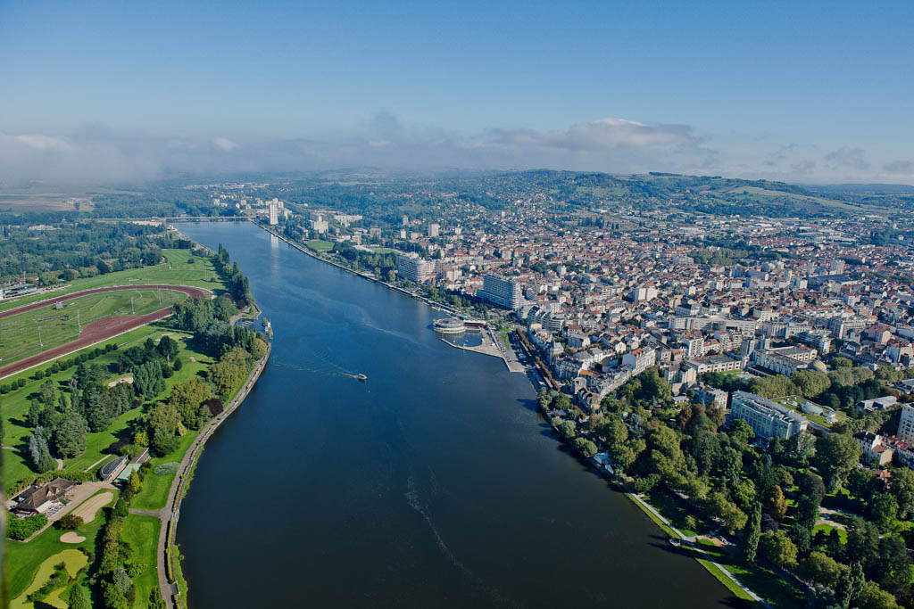 Vichy aujourd hui